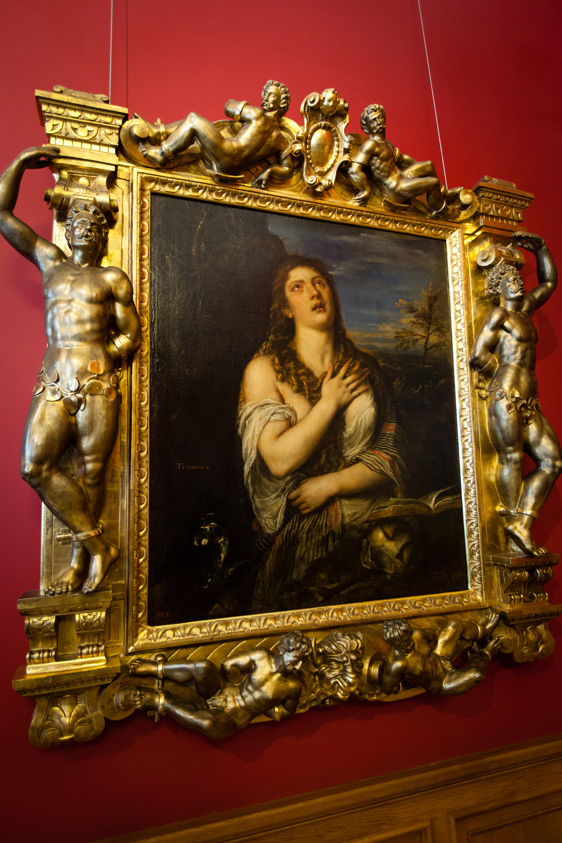 St. Petersburg